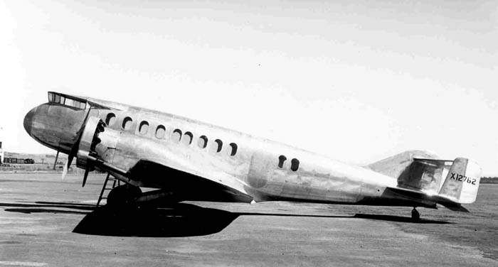 CapelisXC12side